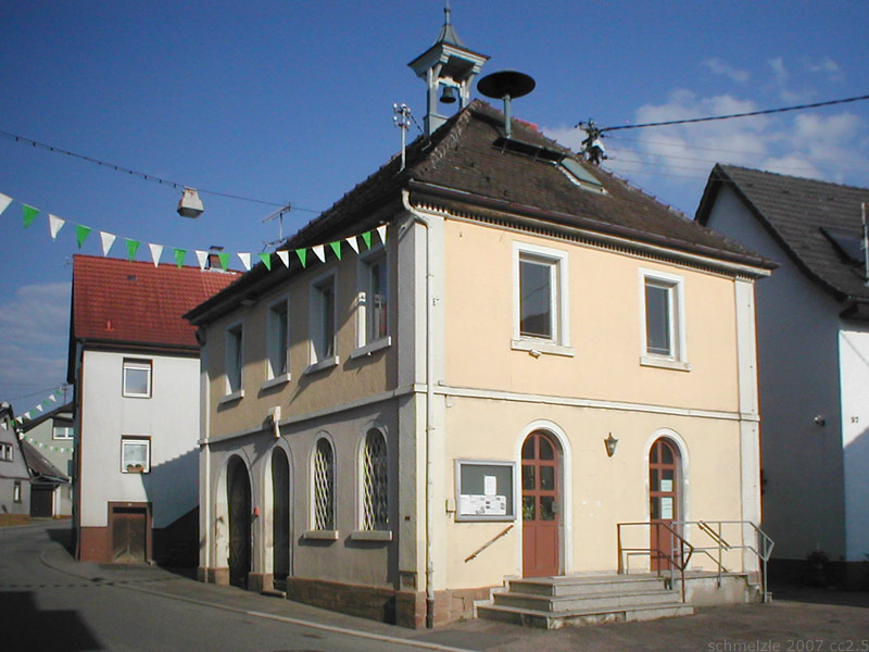 Rathaus in Meckesheim-Mönchzell, Baden-Württemberg, Deutschland